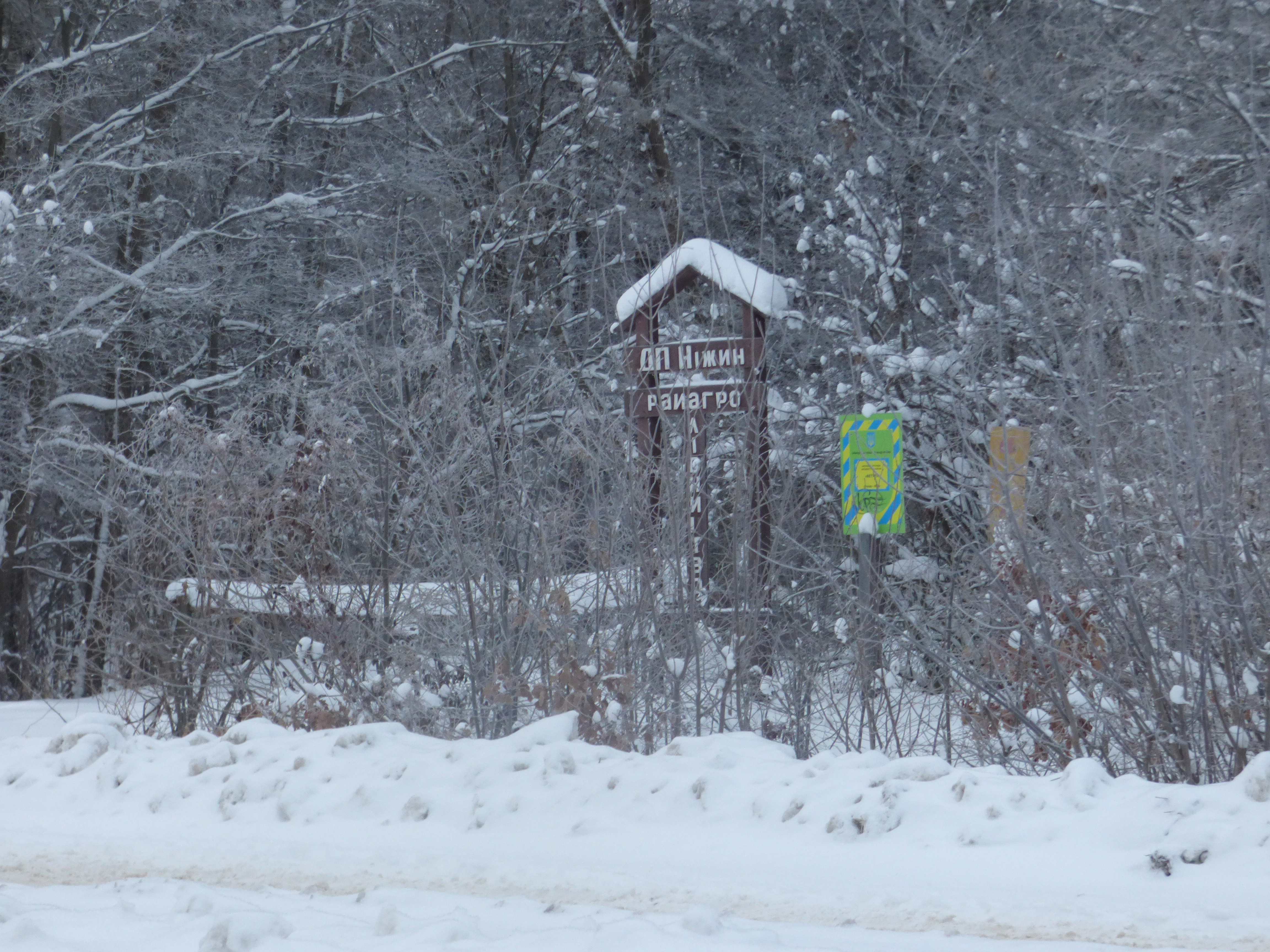 Ветхе, Ніжинський район, м. Ніжин